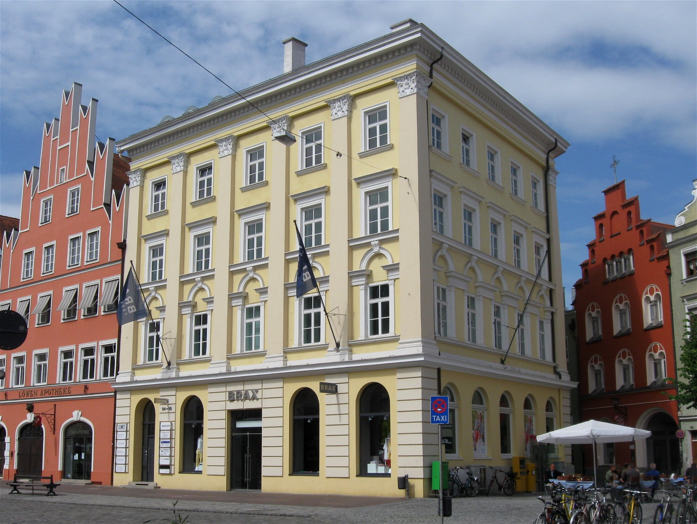 Altstadt 94/95. Wohn- und Geschäftshaus in Ecklage, viergeschossig mit Walmdach, Fassade gegliedert durch Pilaster, erbaut von Johann Bernlochner, Mitte 19. Jh. D-2-61-000-77